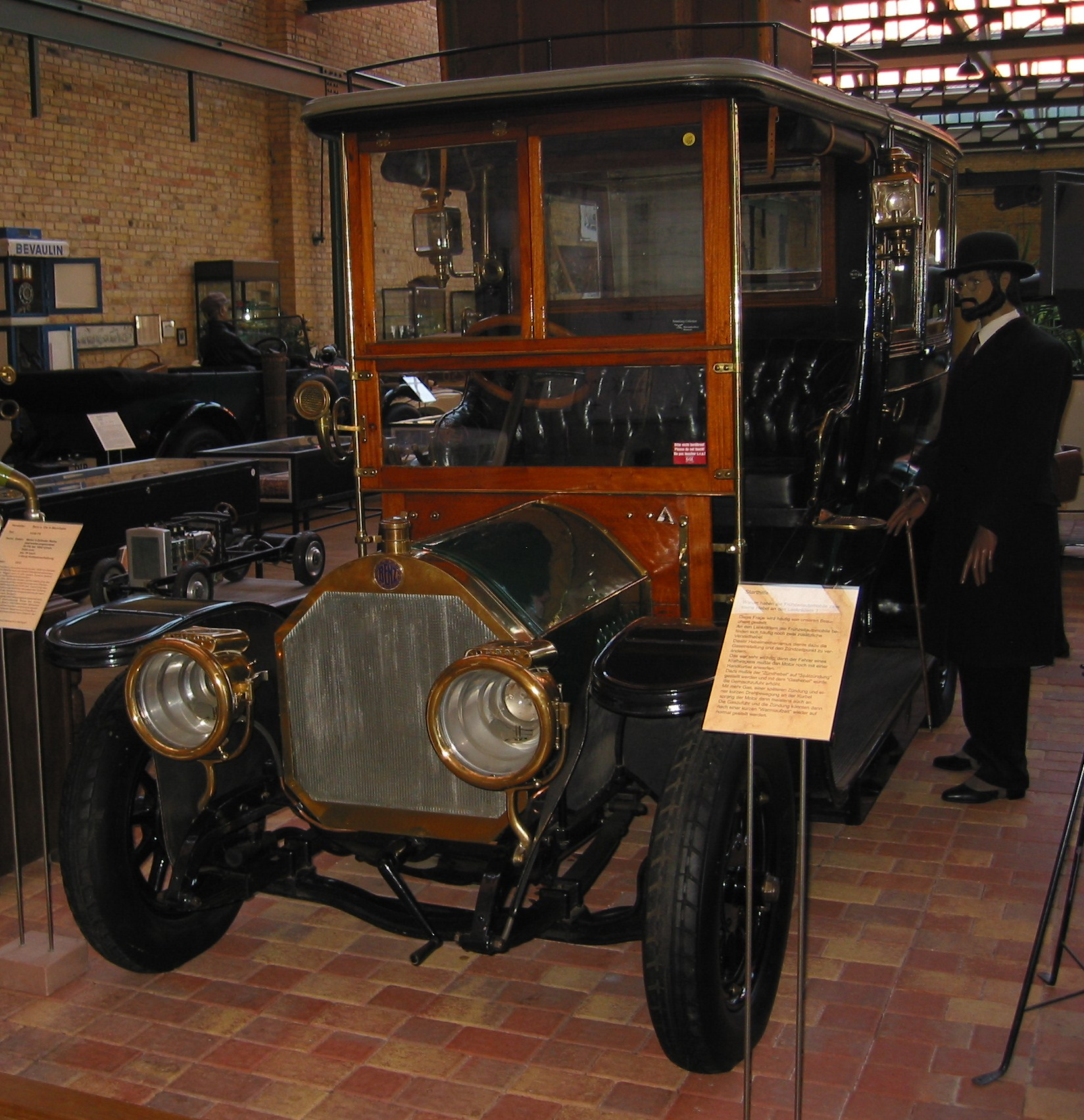 Benz 14/30 PS 1910